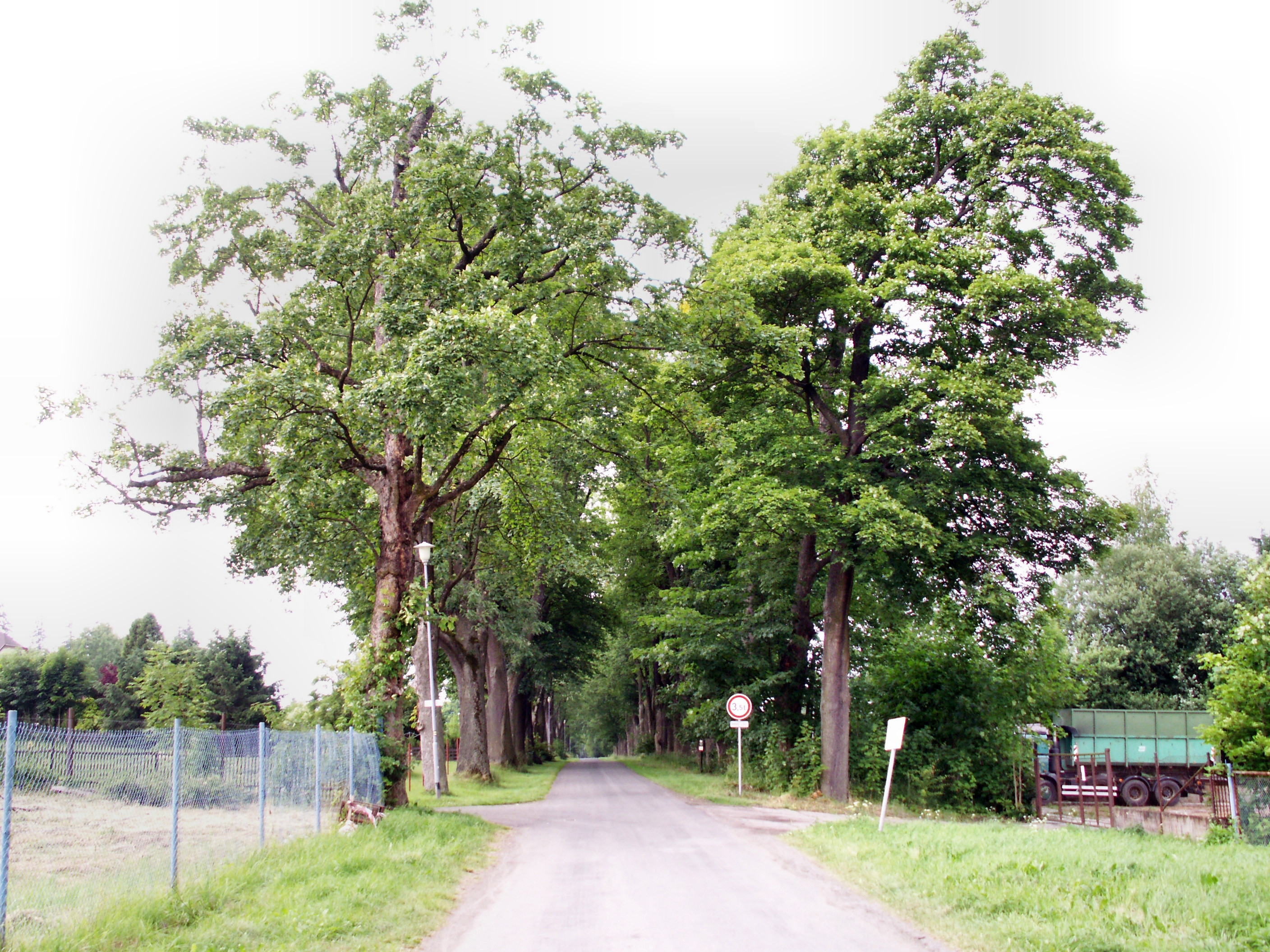 klenová alej ve Starém Ransku, okres Havlíčkův Brod